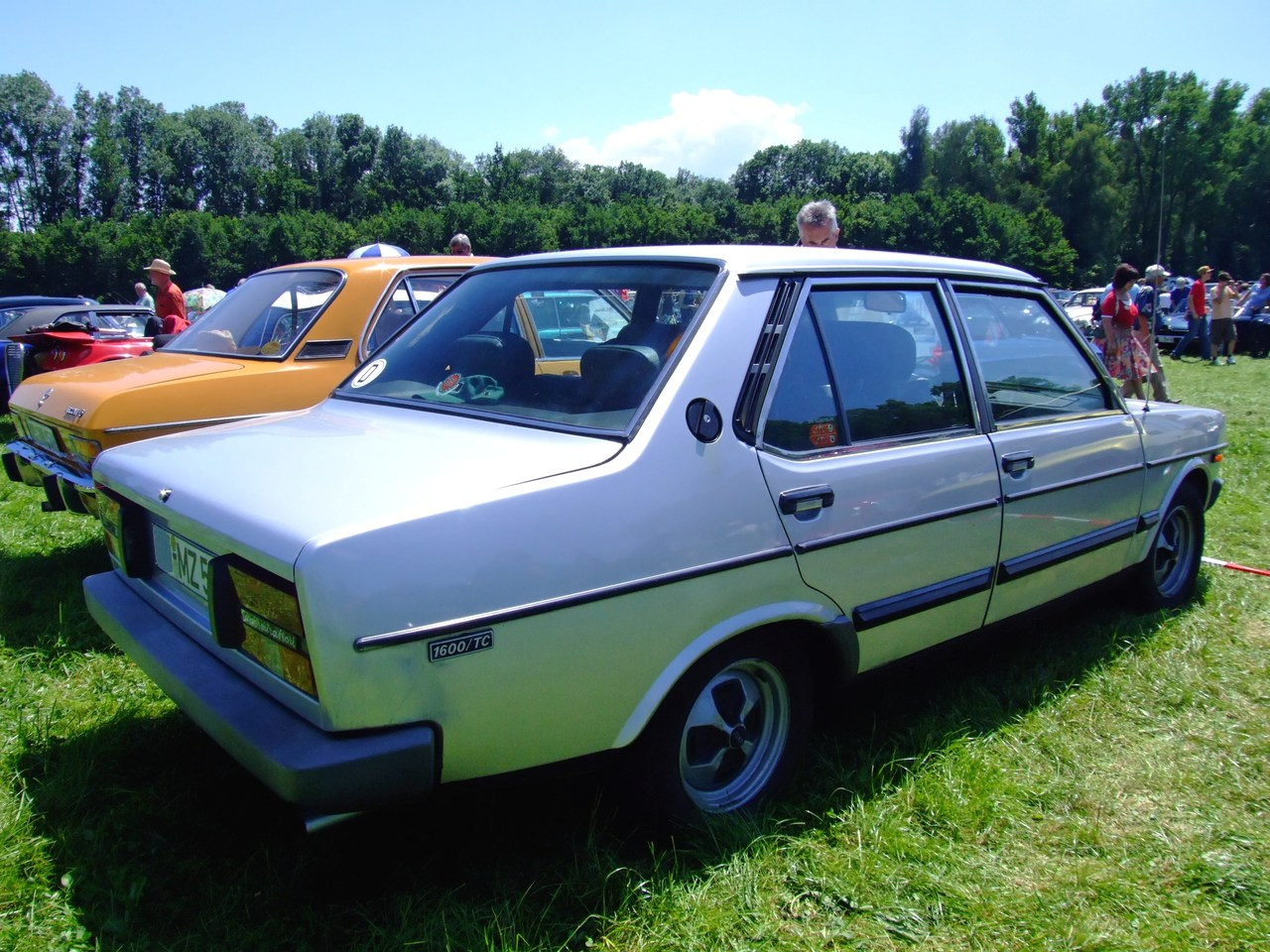 Quelle: selbst fotografiert, 06/2007 Fotograf: Späth Chr.